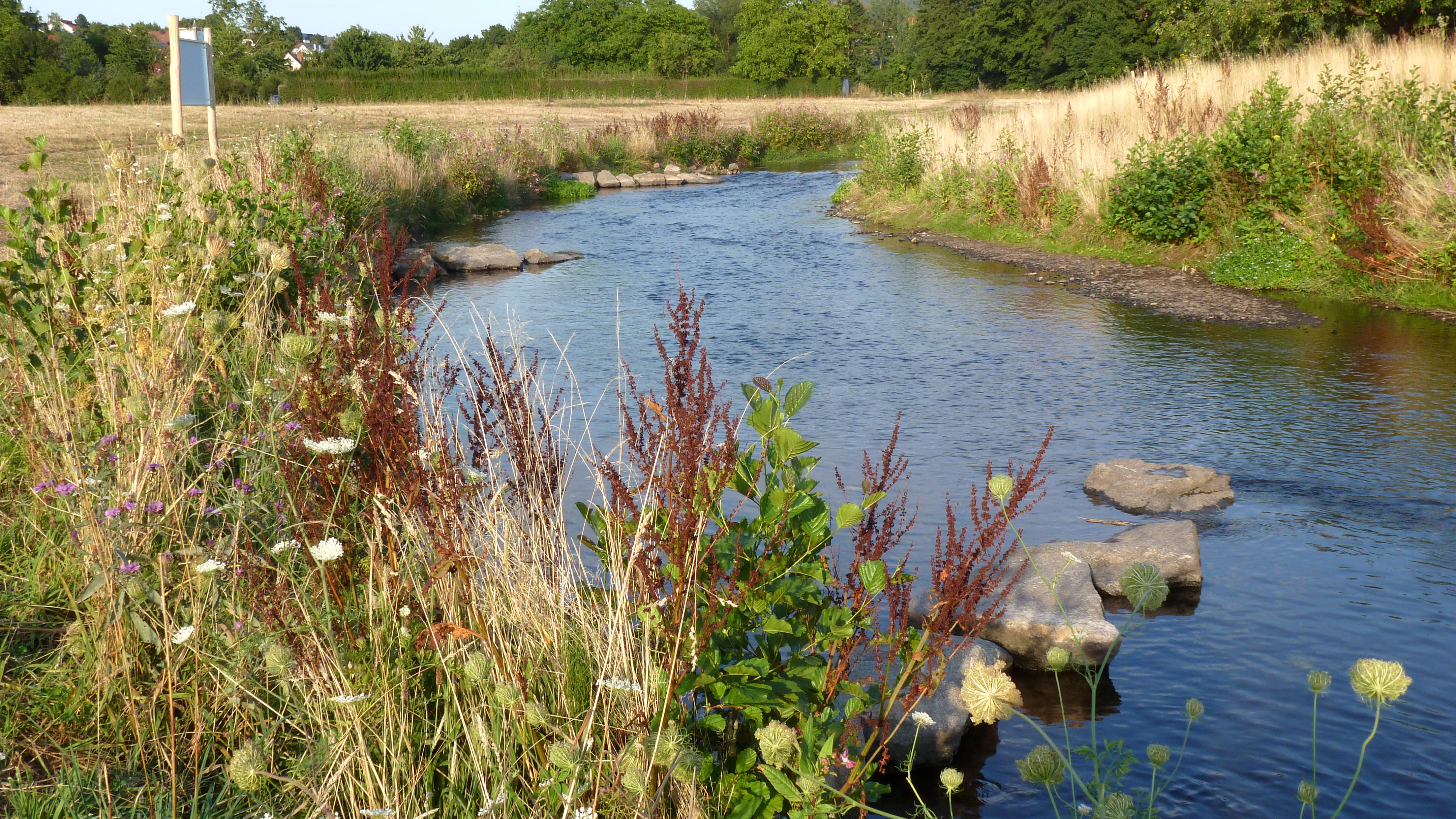 Die renaturierte Kahl im Gelände der Landesgartenschau in Alzenau